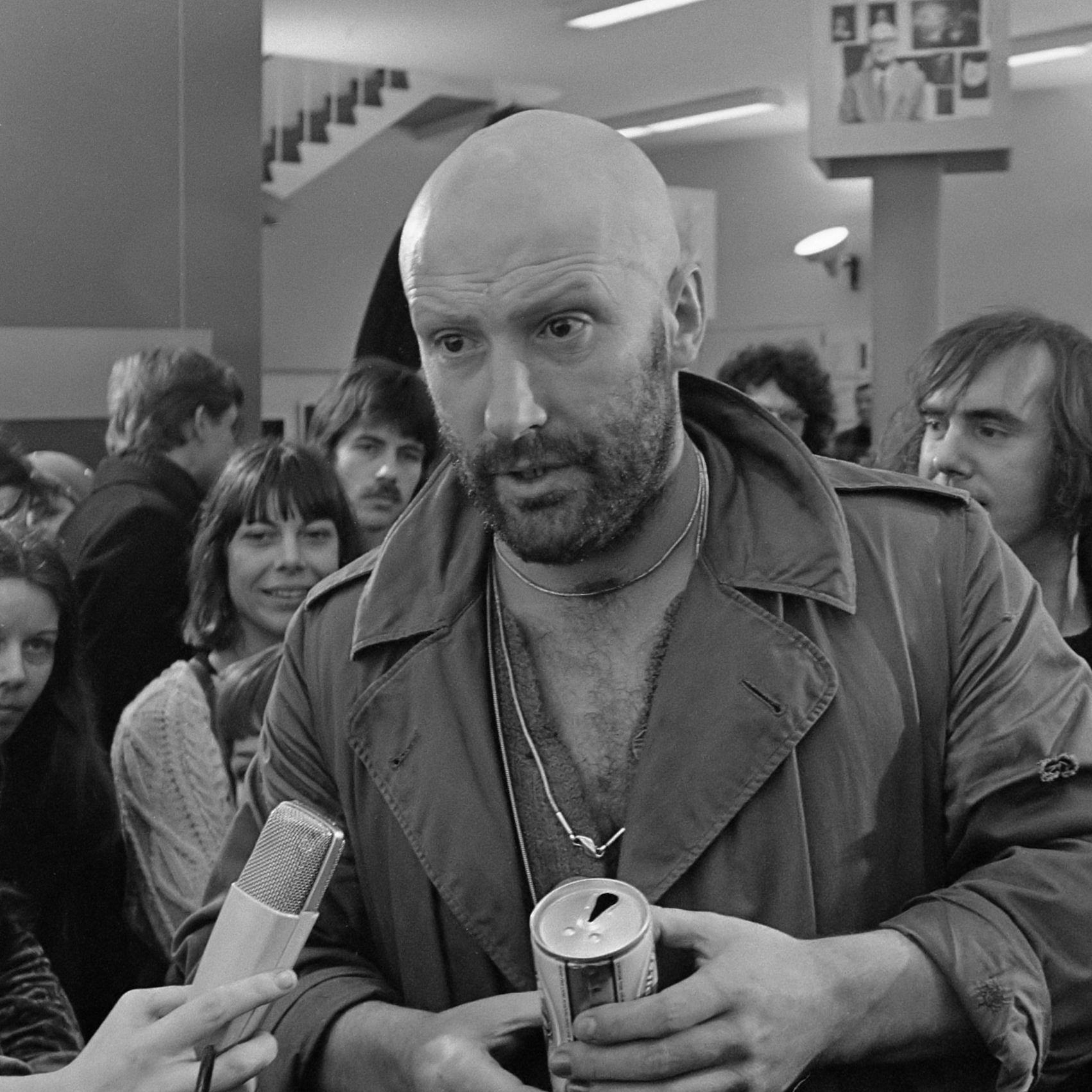 Psycholoog Henk Jurriaans als kunstwerk tentoon gesteld Stedelijk Museum in Amsterdam; kunstwerk Henk Jurriaans 18 januari 1975